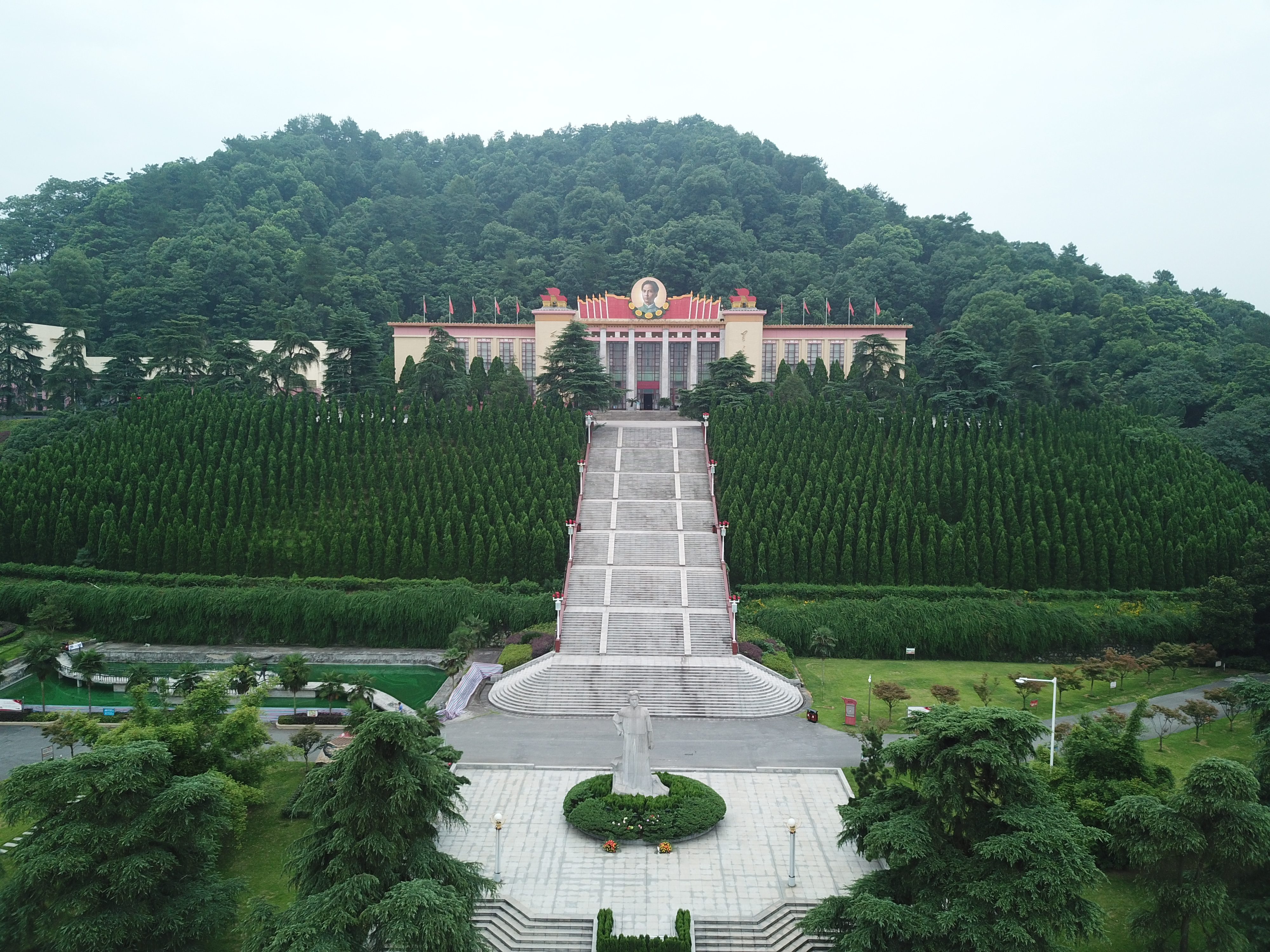 安源路矿工人运动纪念馆